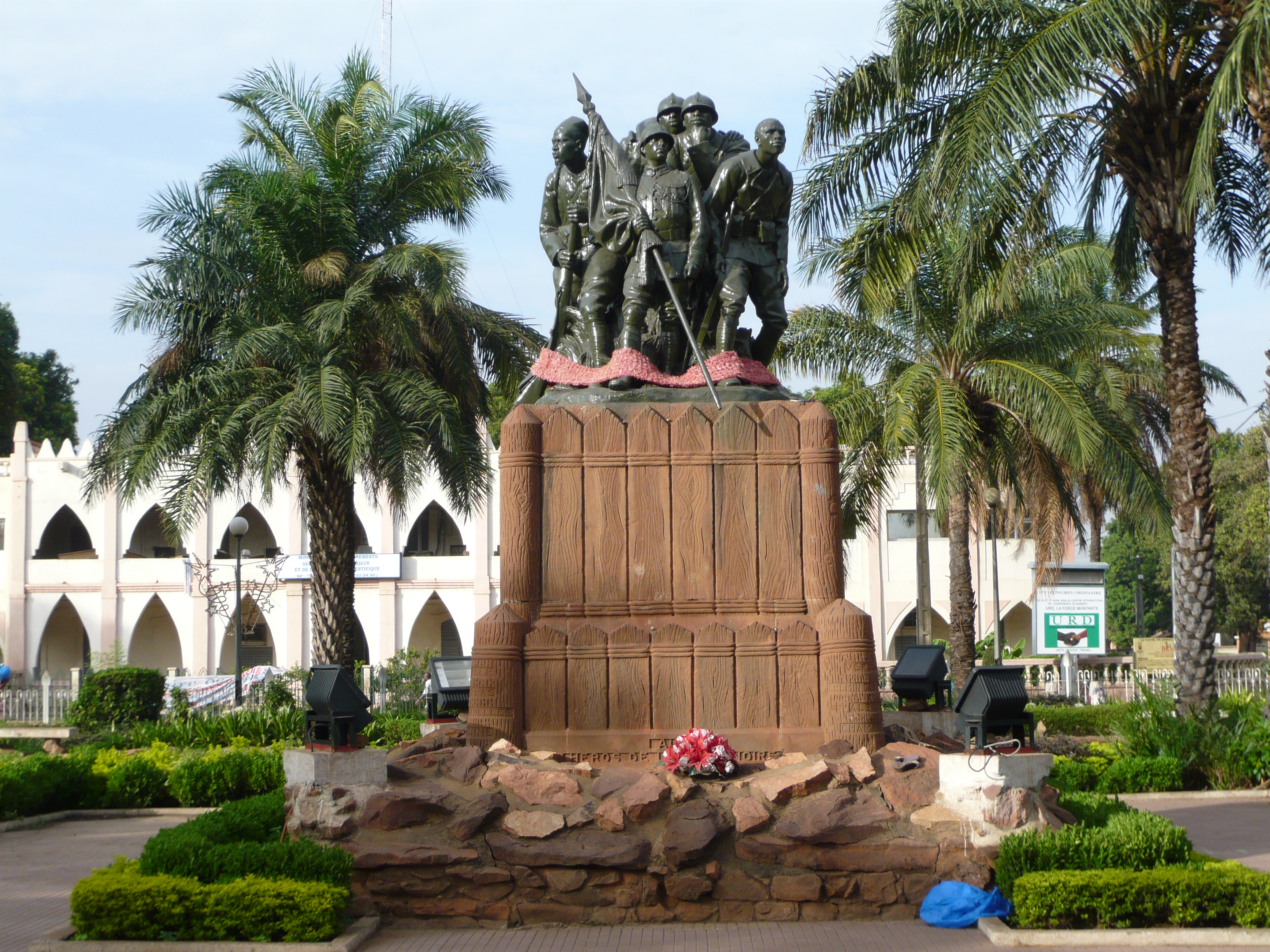 Paul Moreau-Vauthier (1871-1936), Monument aux héros de l'Armée noire, 1924, place de la liberté, Bamako (Mali). Réplique du monument original érigé en 1924 à Reims détruit en 1940 puis rebâti en 2013.